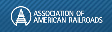 Logo der Association of American Railroads